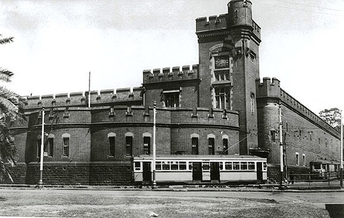 Macquarie_depot_1940's